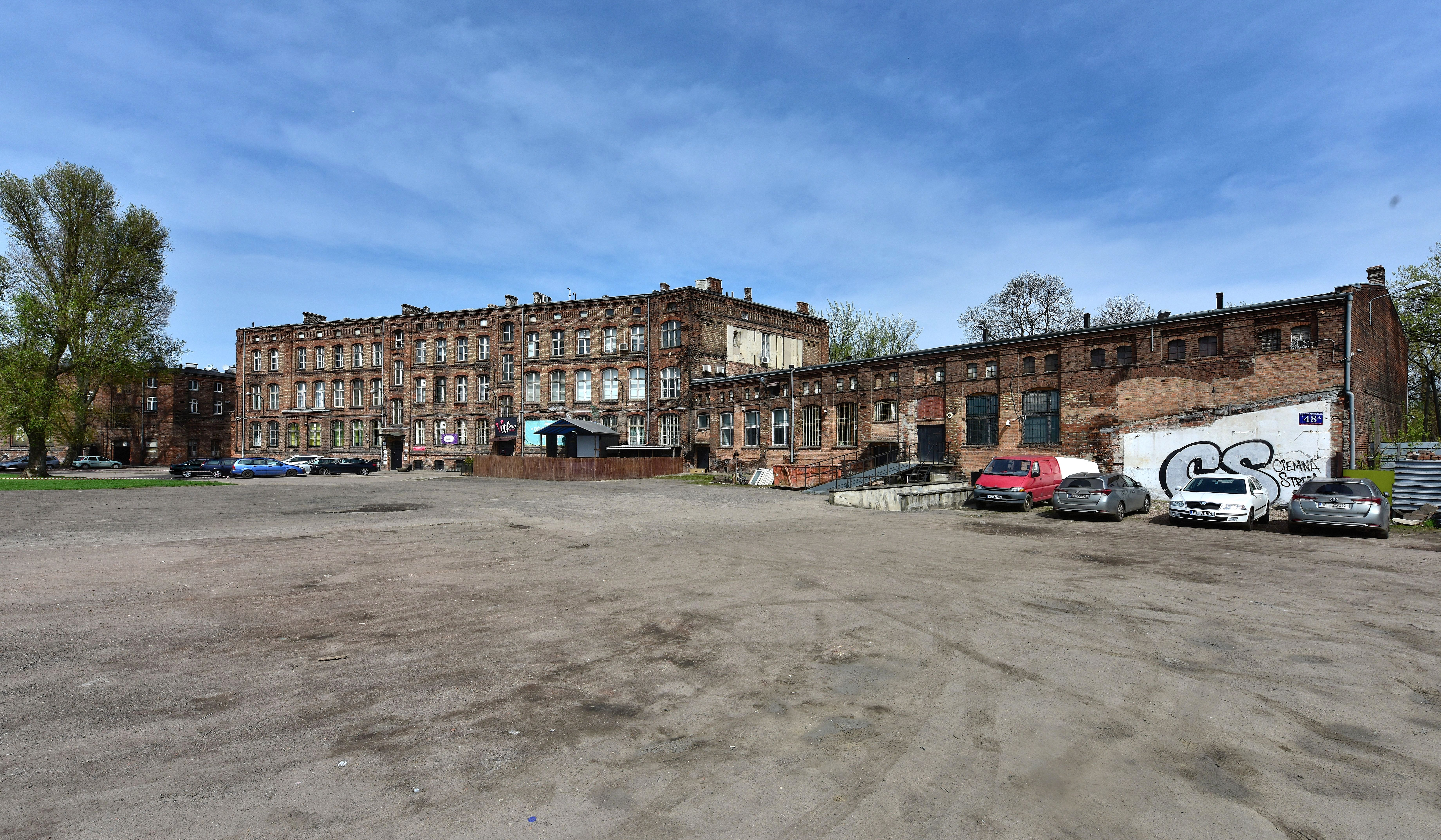 Relikty fabryki Lilpop, Rau i Loewenstein przy ul. Bema w Warszawie